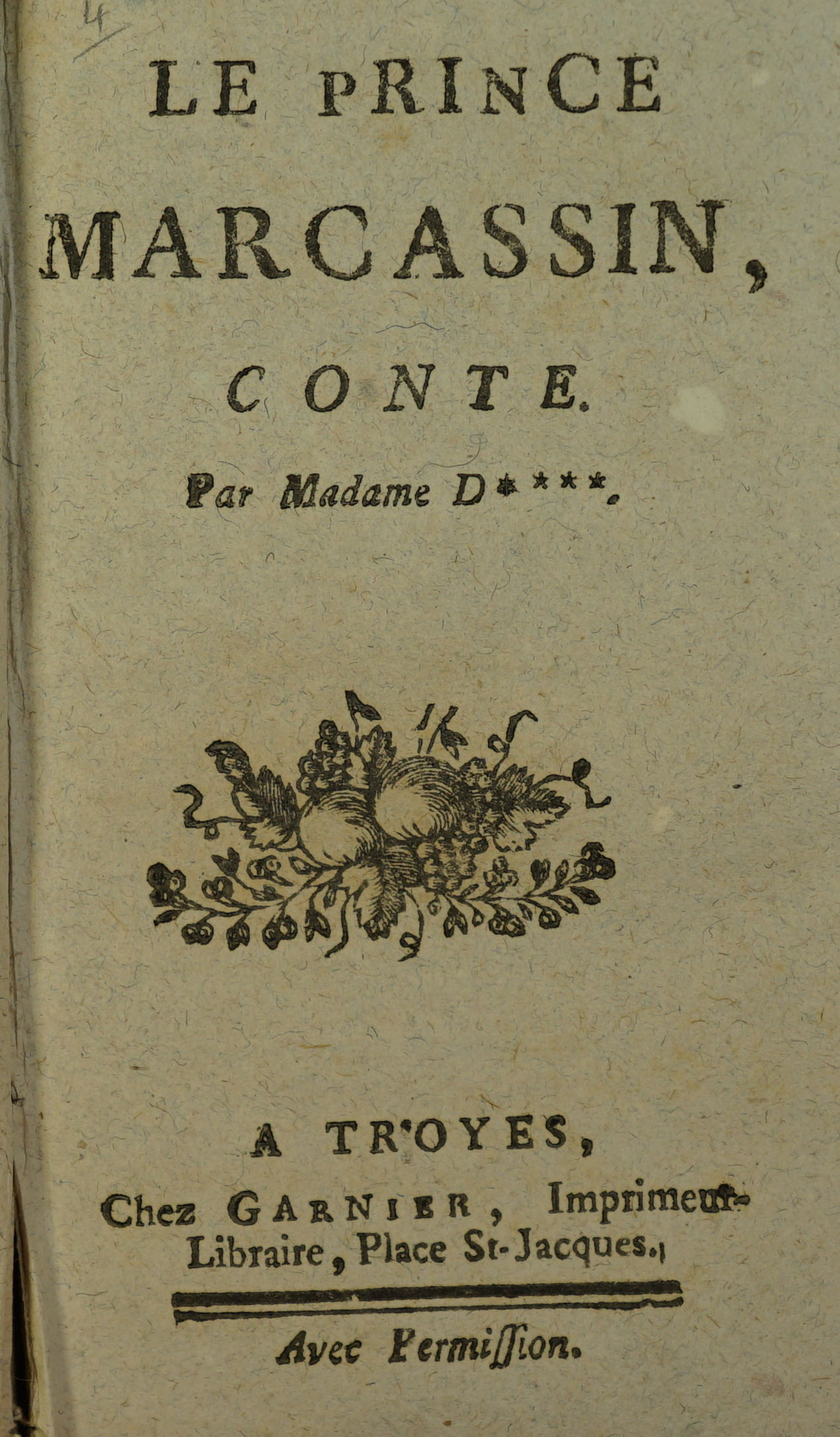 extrait du livre.